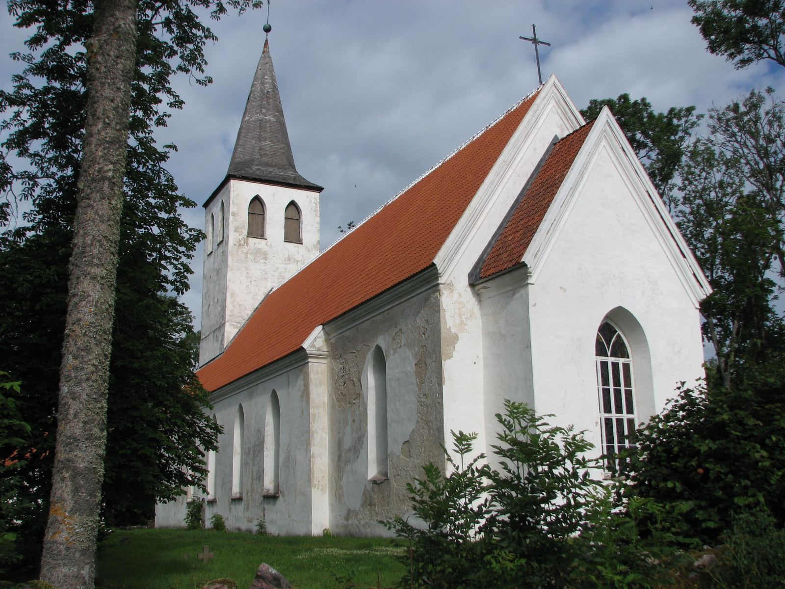 Pühalepa Church, Pühalepa, Hiiumaa, Estonia